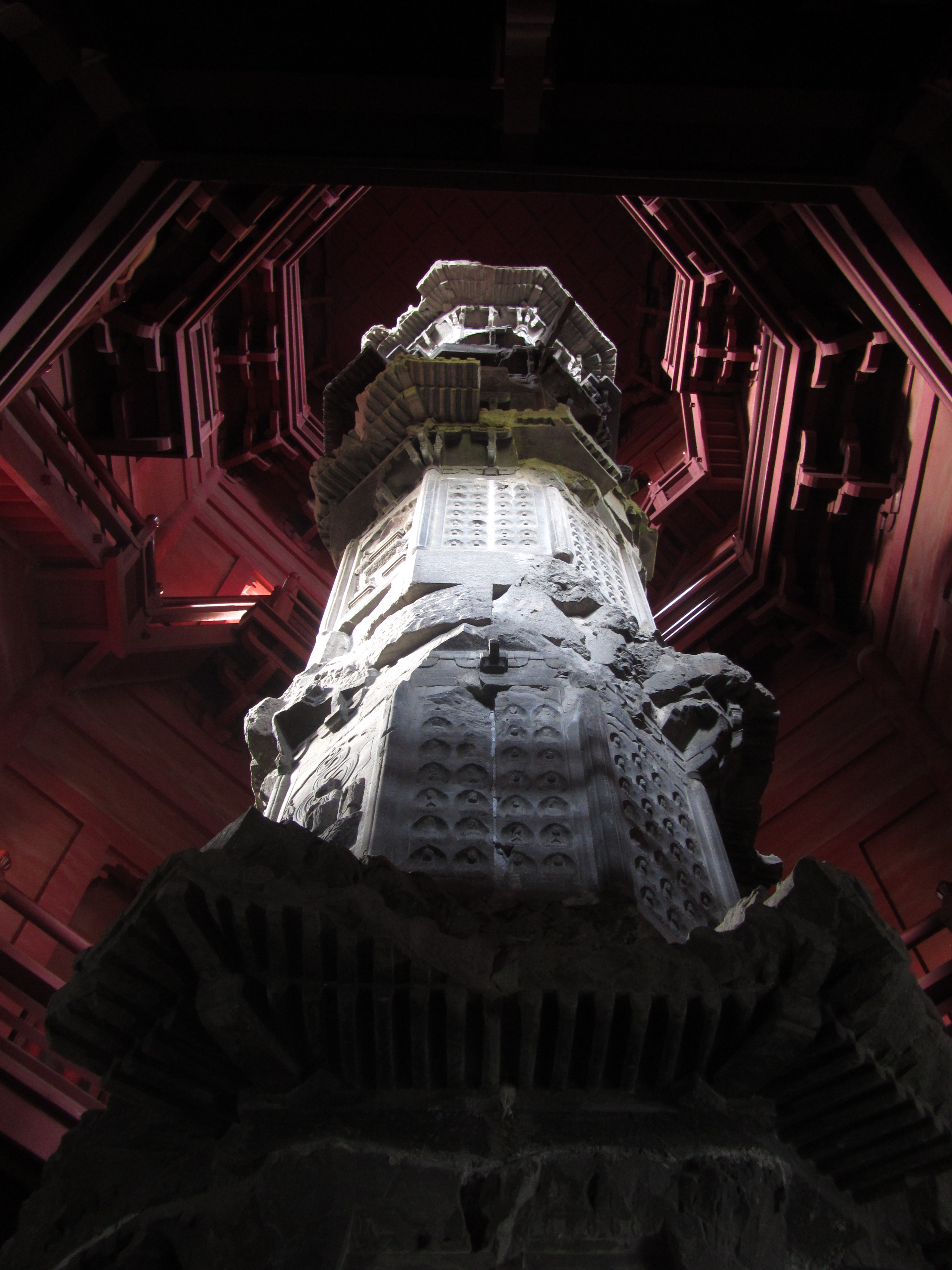 飞英塔，石塔第三至五层仰视。